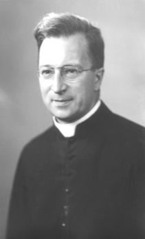 Jean-Marie Poitevin (1907-1987)